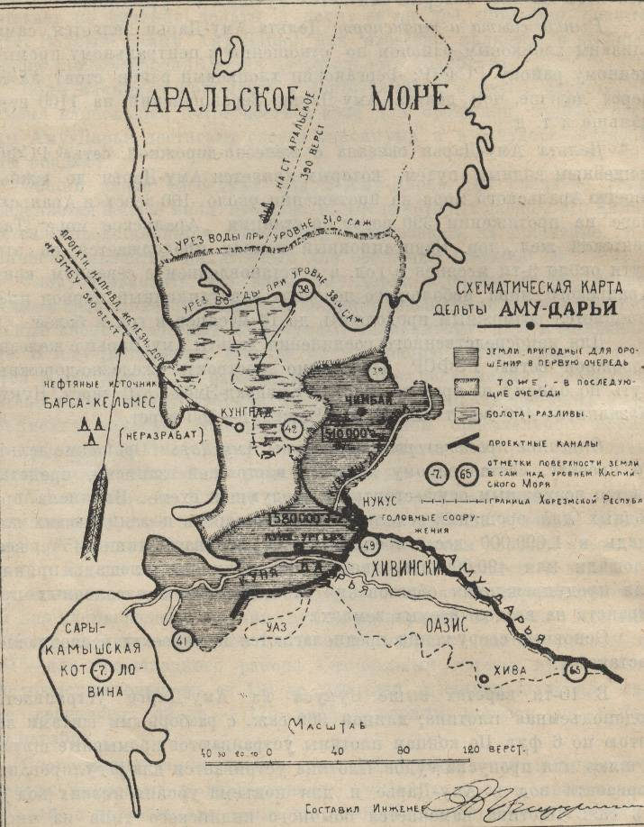 Скан схемы дельты реки Аму-Дарья, 1918 год